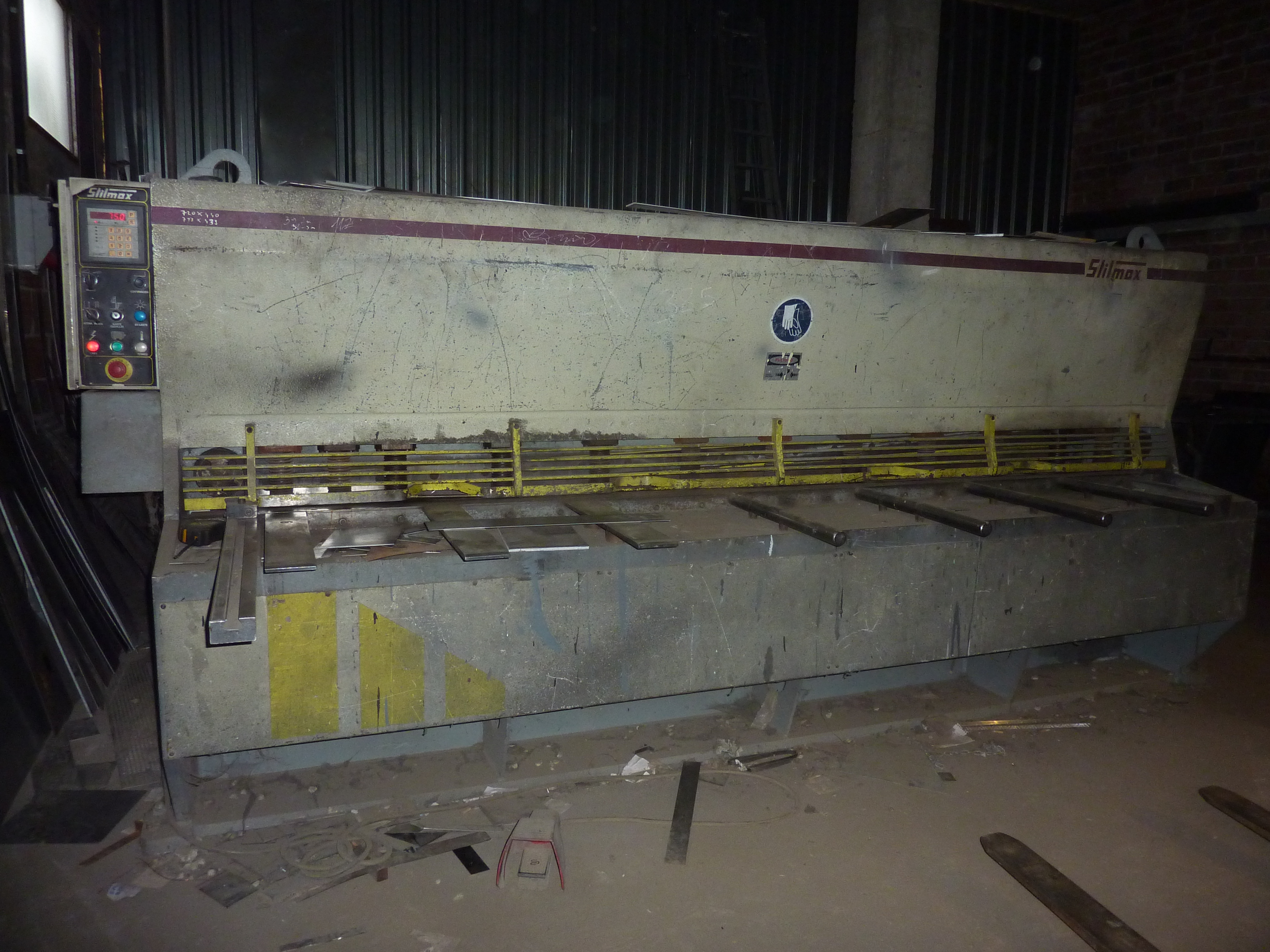 Cisalla de planxa